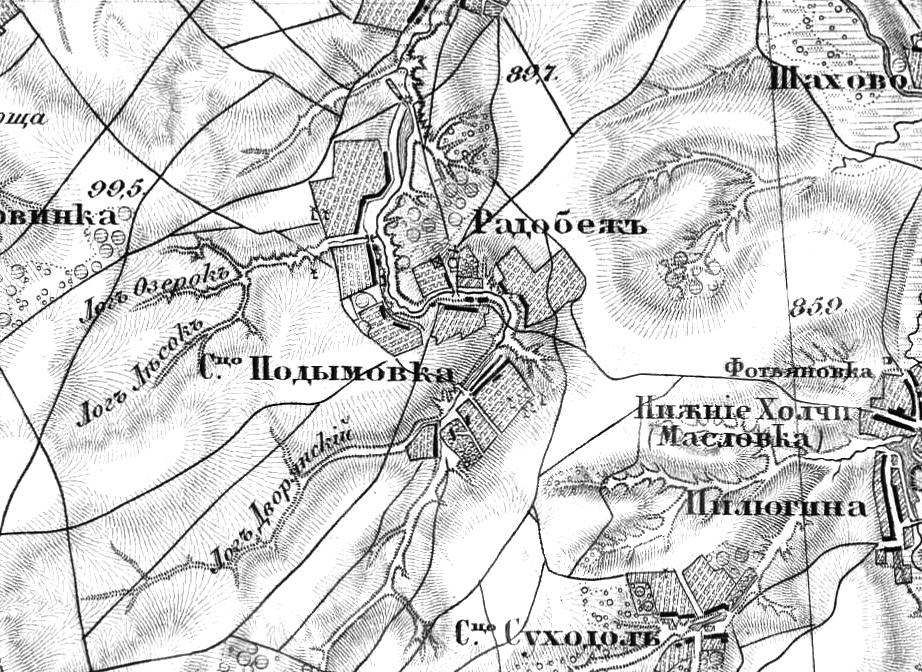 Карта окрестностей села Радубеж